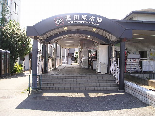 近鉄田原本線西田原本駅 2006年09月23日 日本語版投稿者により撮影